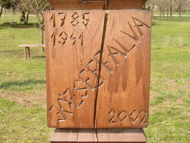 Detail from Kopjafa